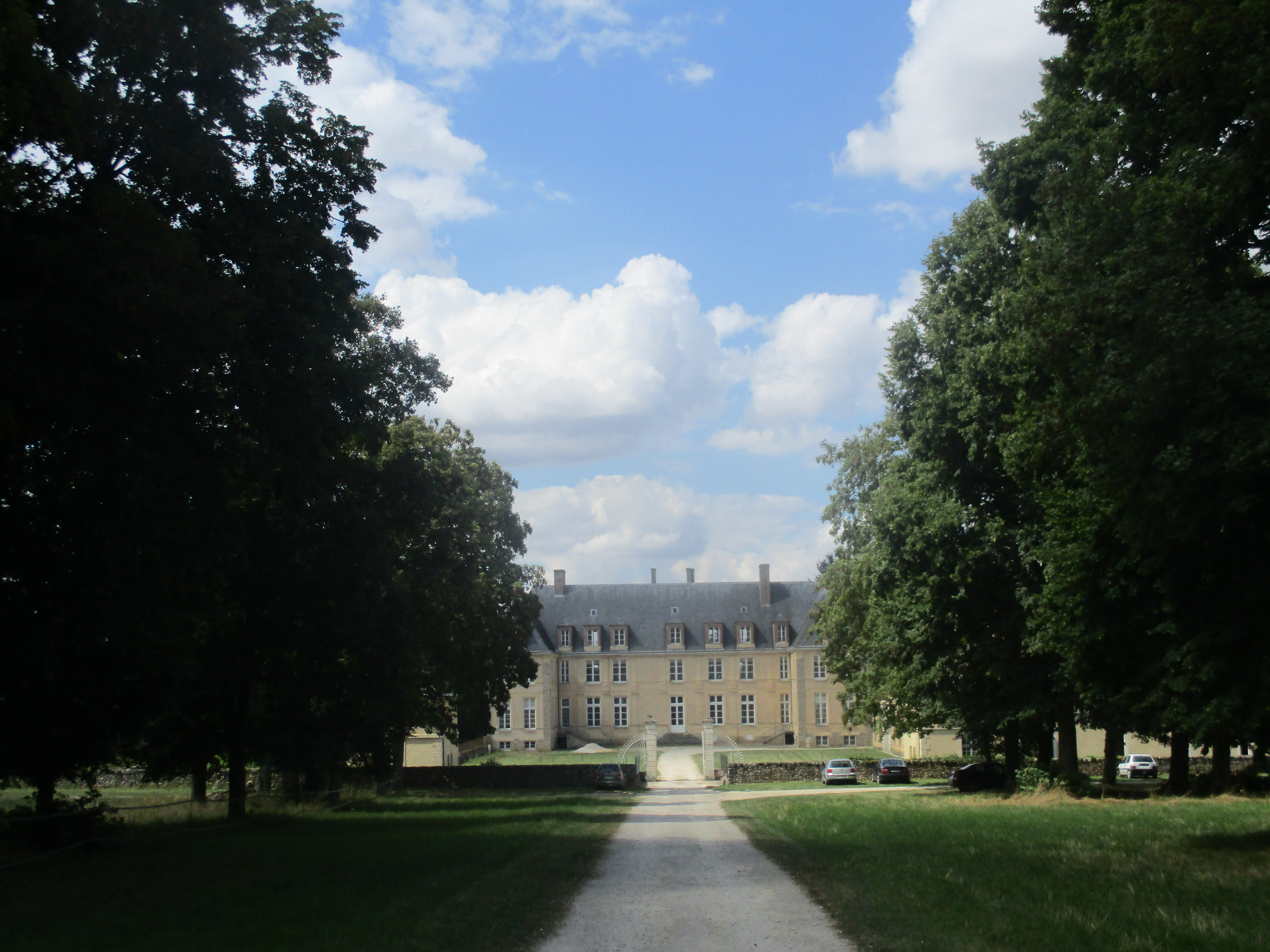 Château de Passy (Yonne).